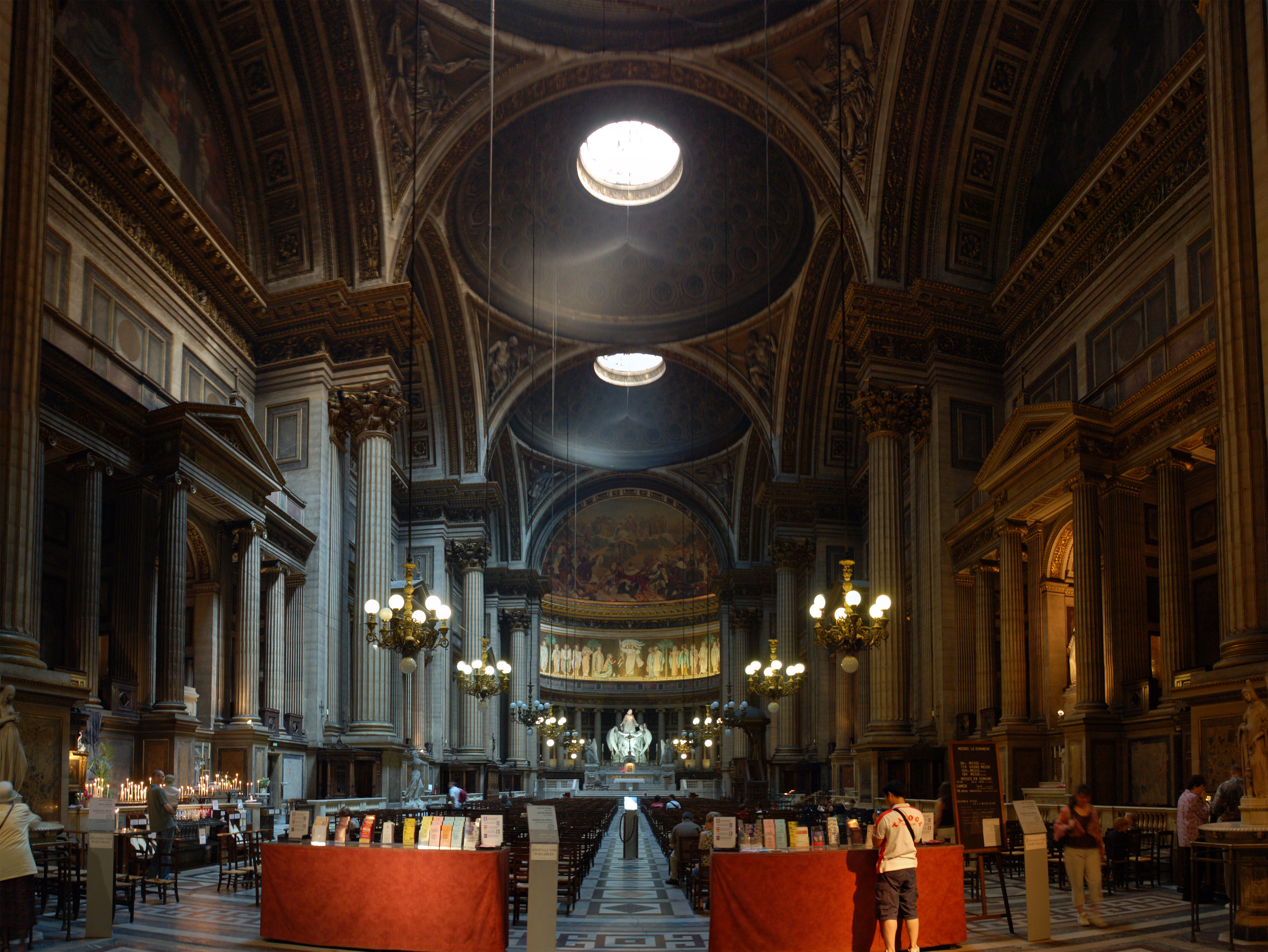 Vue intérieure de l'église de la Madeleine, Paris